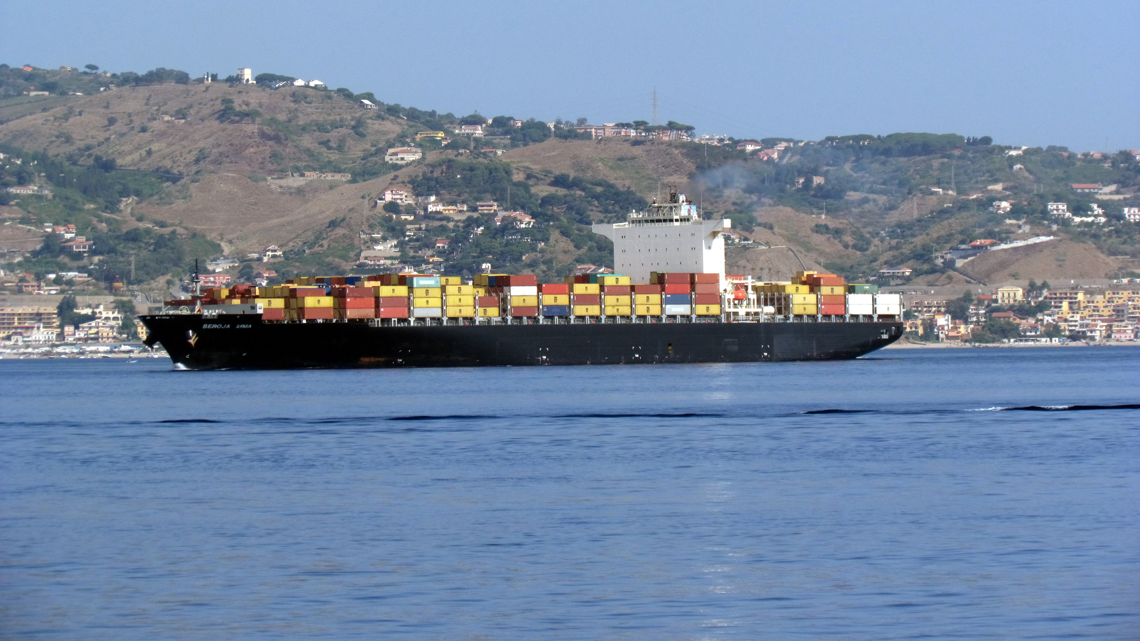 Portacontainer MSC in navigazione nello stretto di Messina